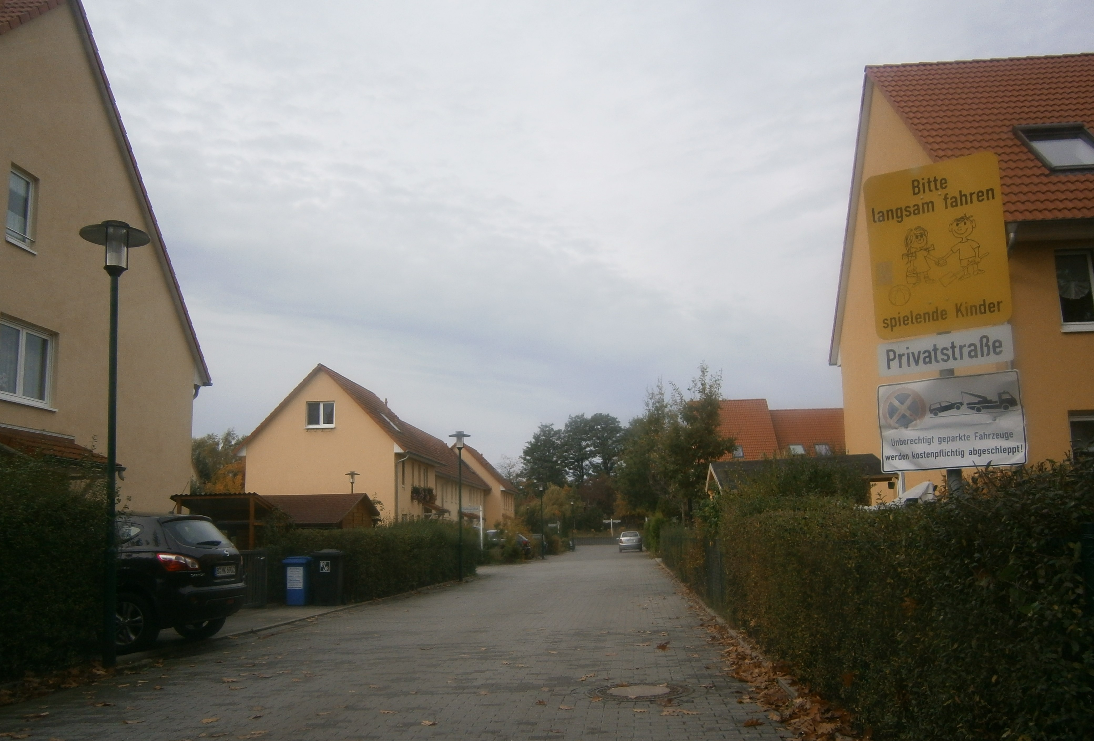 Mustangweg ist eine Straße in Berlin-Frohnau in der Wohnanlage Am Poloplatz. Hier der Blick von der Gollanzcstraße westwärts.